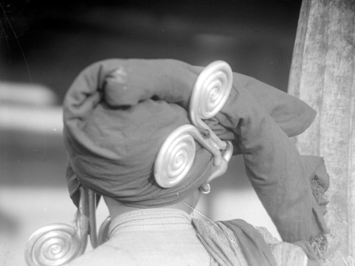 Repronegatief. Een Batakvrouw met hoofddoek en oorsierraden (padoeng padoeng), Karolanden